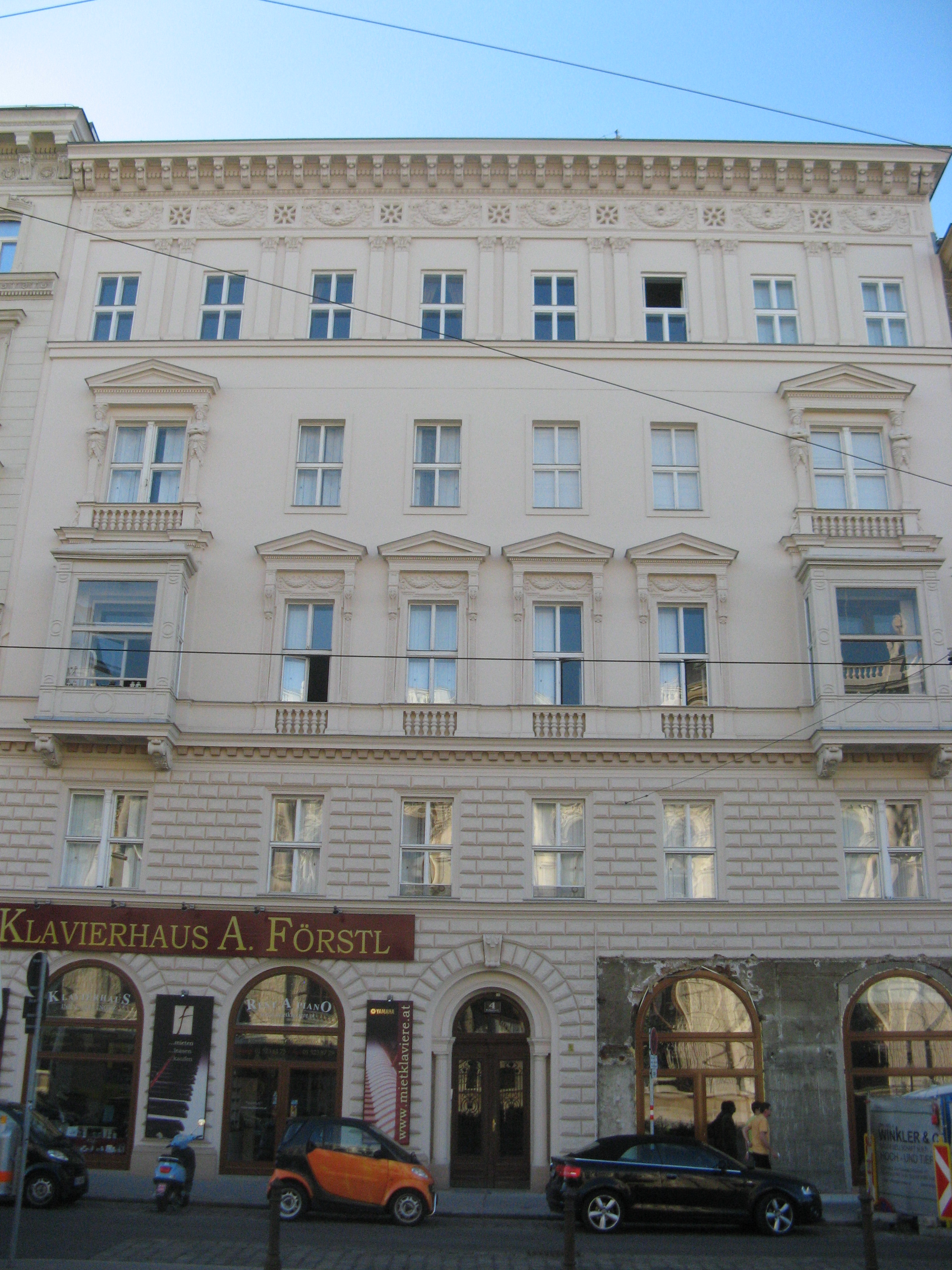 Miethaus (1869/70) von Otto Wagner, Bellariastraße 4, Wien-Innere Stadt